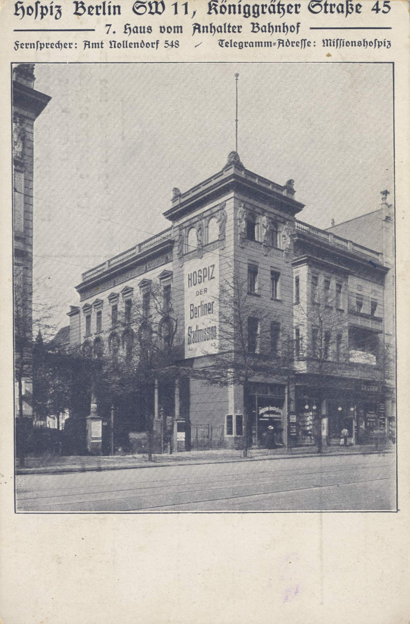 Hospiz der Berliner Stadtmission am Anhalter Bahnhof, Königgrätzer Straße 45 (heute Stresemannstraße), Berlin-Kreuzberg